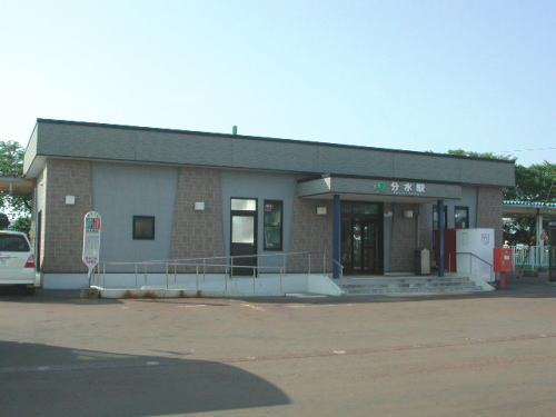 JR分水駅